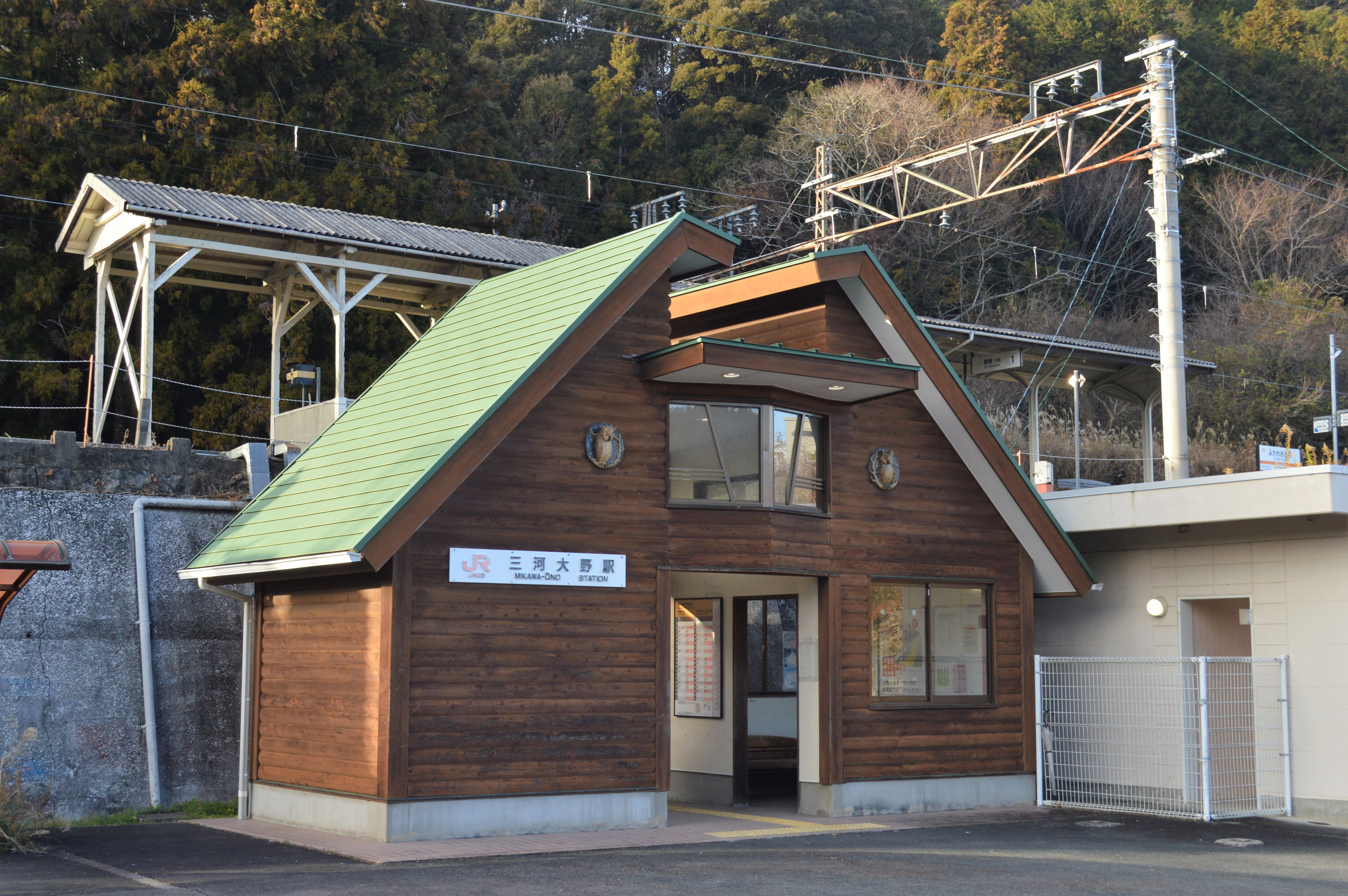 JR飯田線三河大野駅。愛知県新城市。